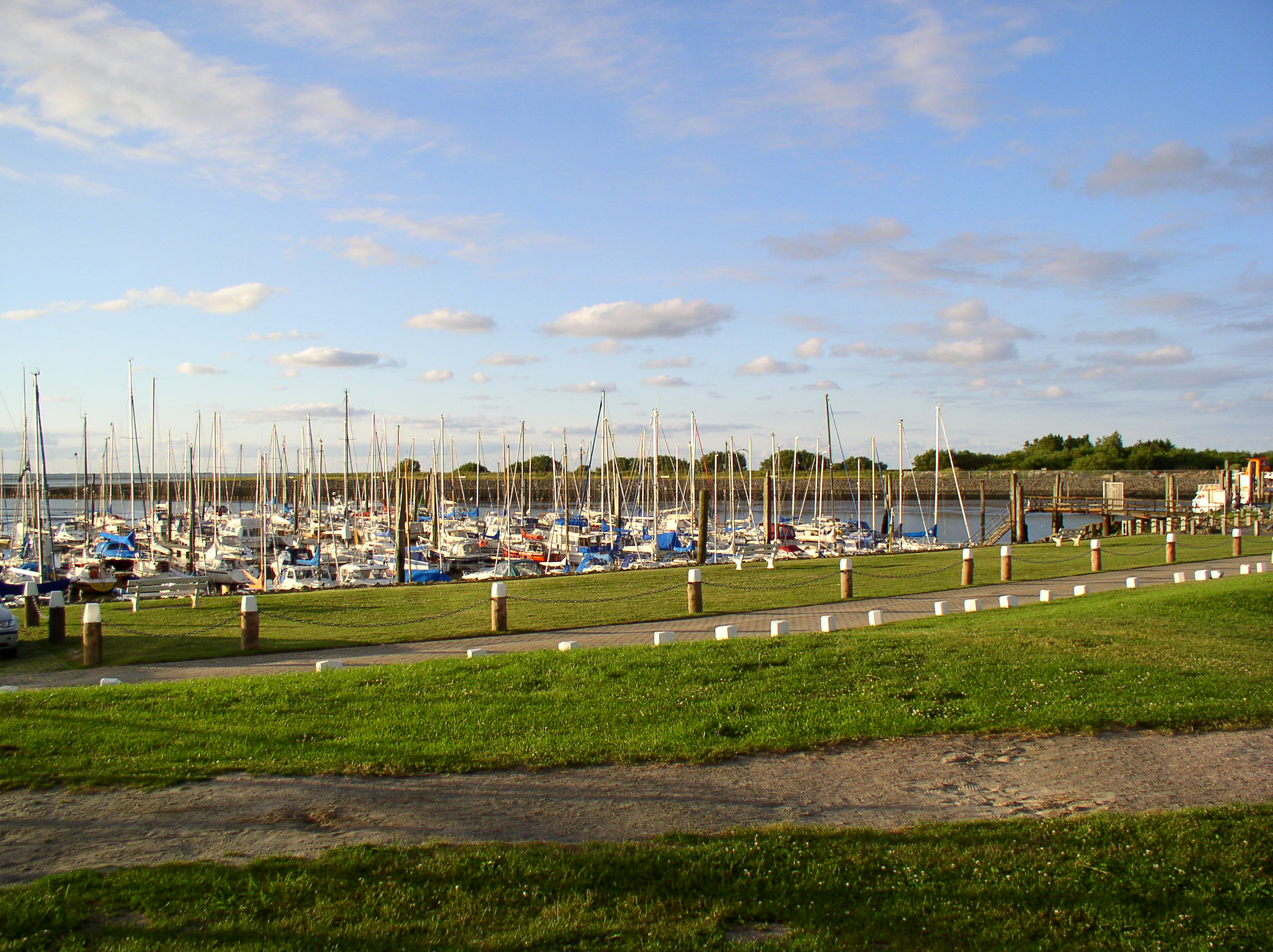 Jachthafen Bensersiel